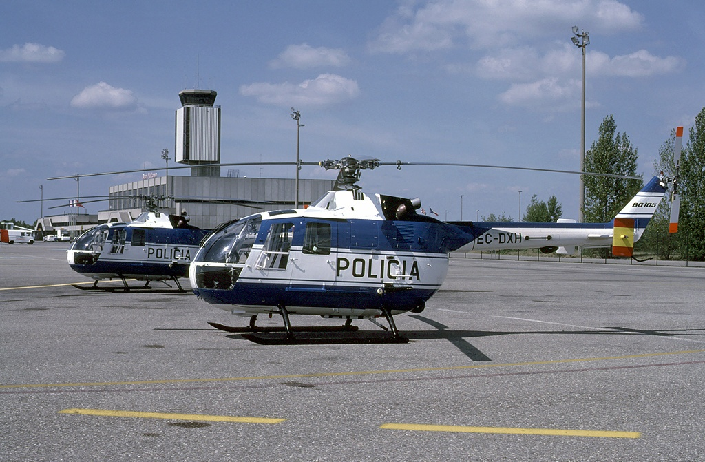 EC-DXH (cn S4-698) And EC-DXI